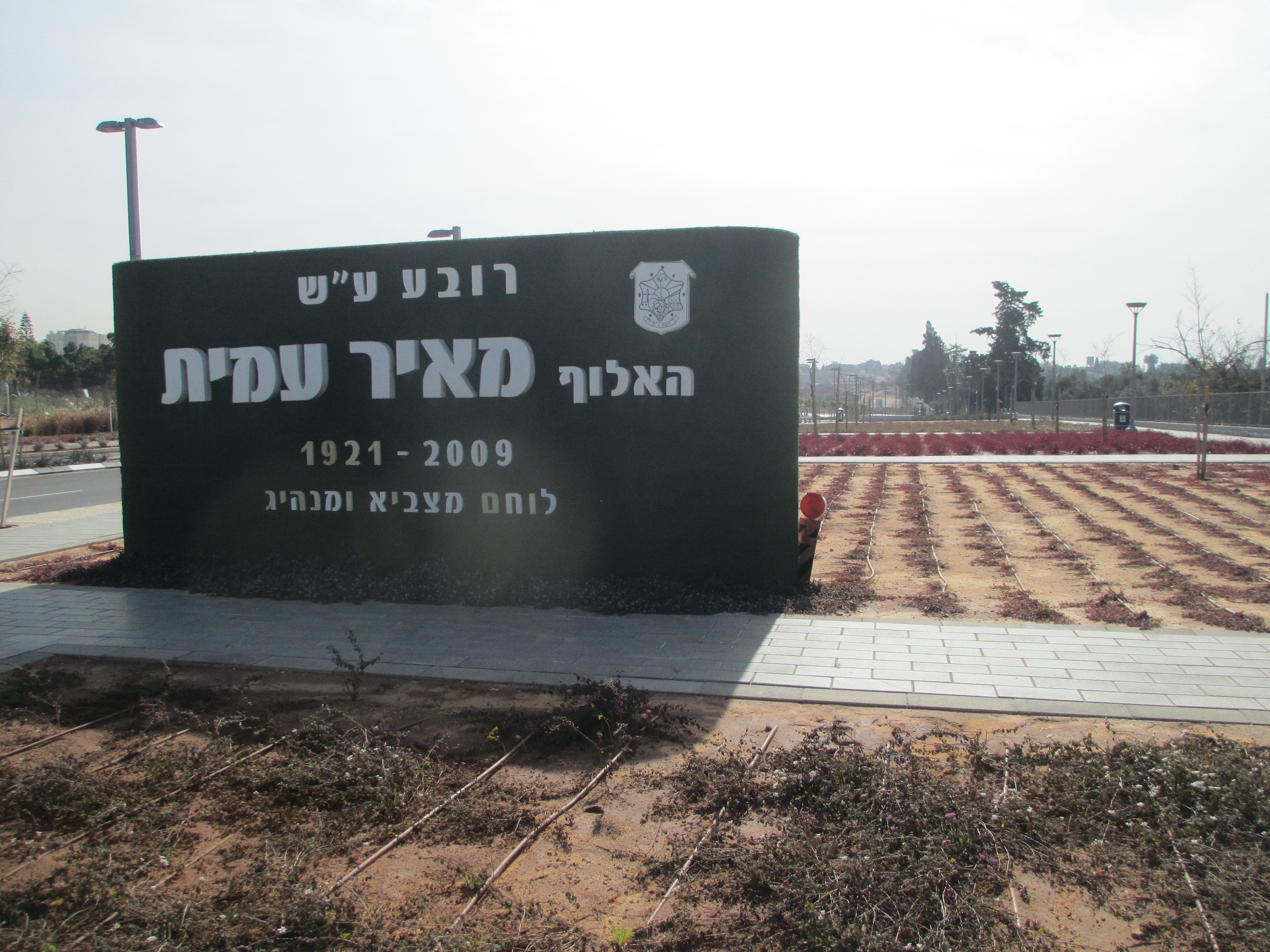 רובע מאיר עמית בשכונת קריית קריניצי החדשה ברמת גן